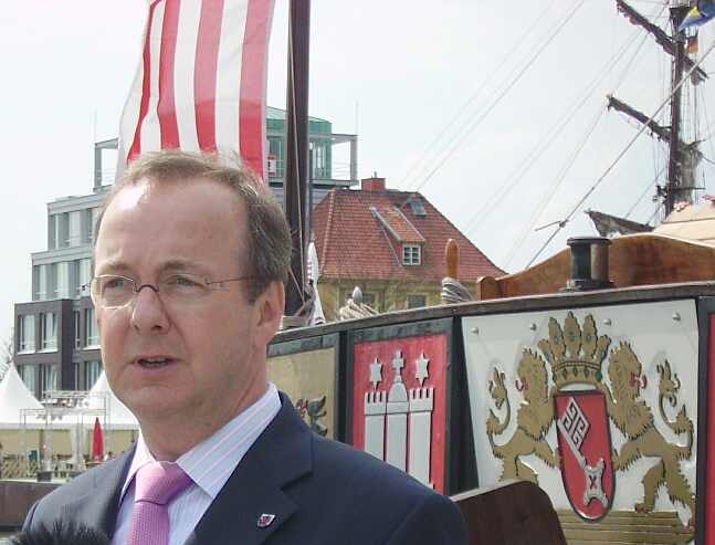 Ralf Nagel, Senator für Wirtschaft, Häfen und Justiz der Freien Hansestadt Bremen bei der Eröffnung der 33. Bremerhavener Festwoche am 25.07.2007 (Ralf Nagel, the senator (i.e. minister) of economics, harbour and justice of the German federal state of Bremen)